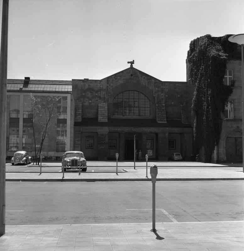 24.5.1959 Nürnberg Germanisches National-Museum am Kornmarkt